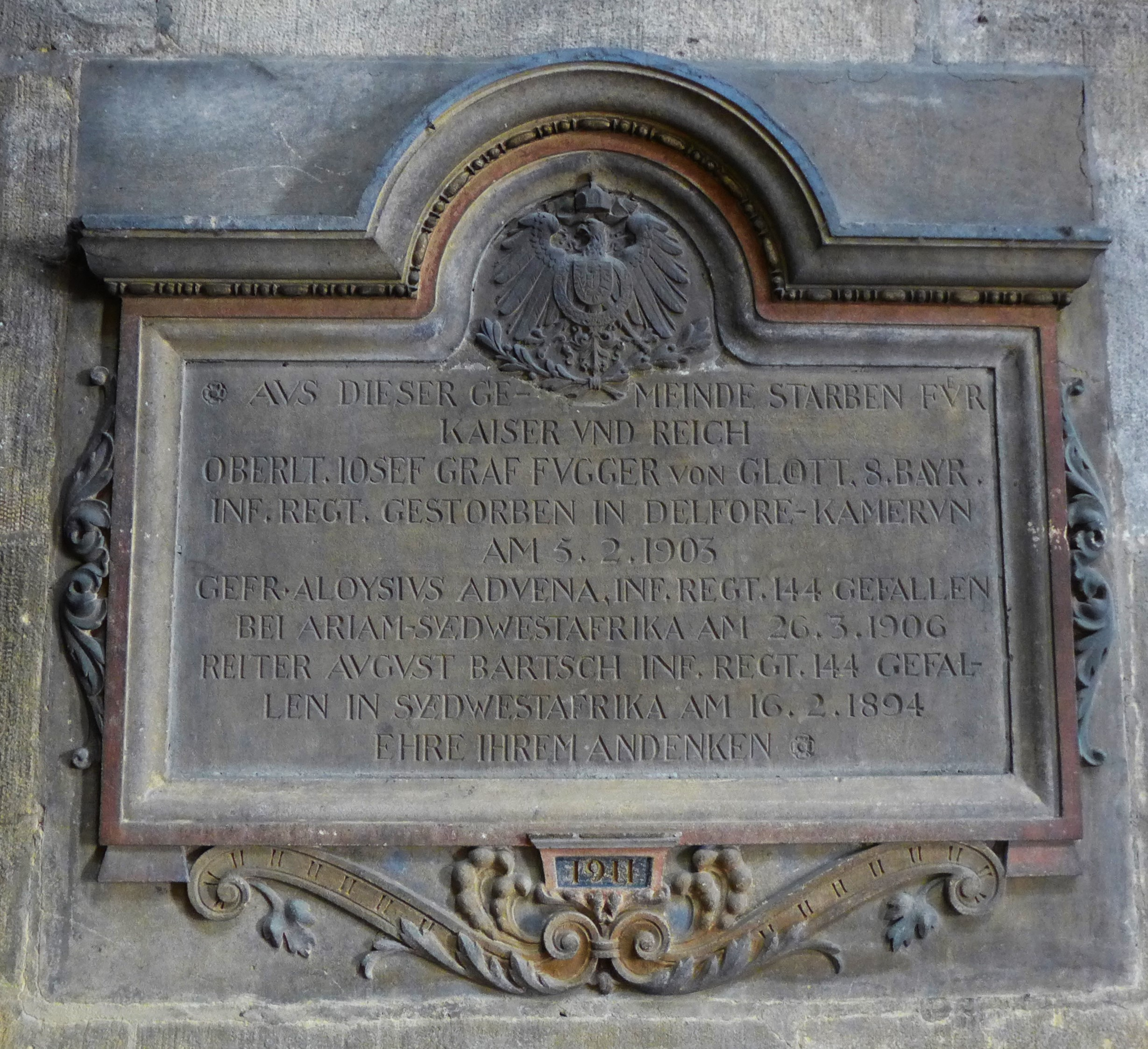 Metzer Dom, Gedenktafel aus dem Jahr 1911 am Eingang der Karmelkapelle für Gefallene der Domgemeinde